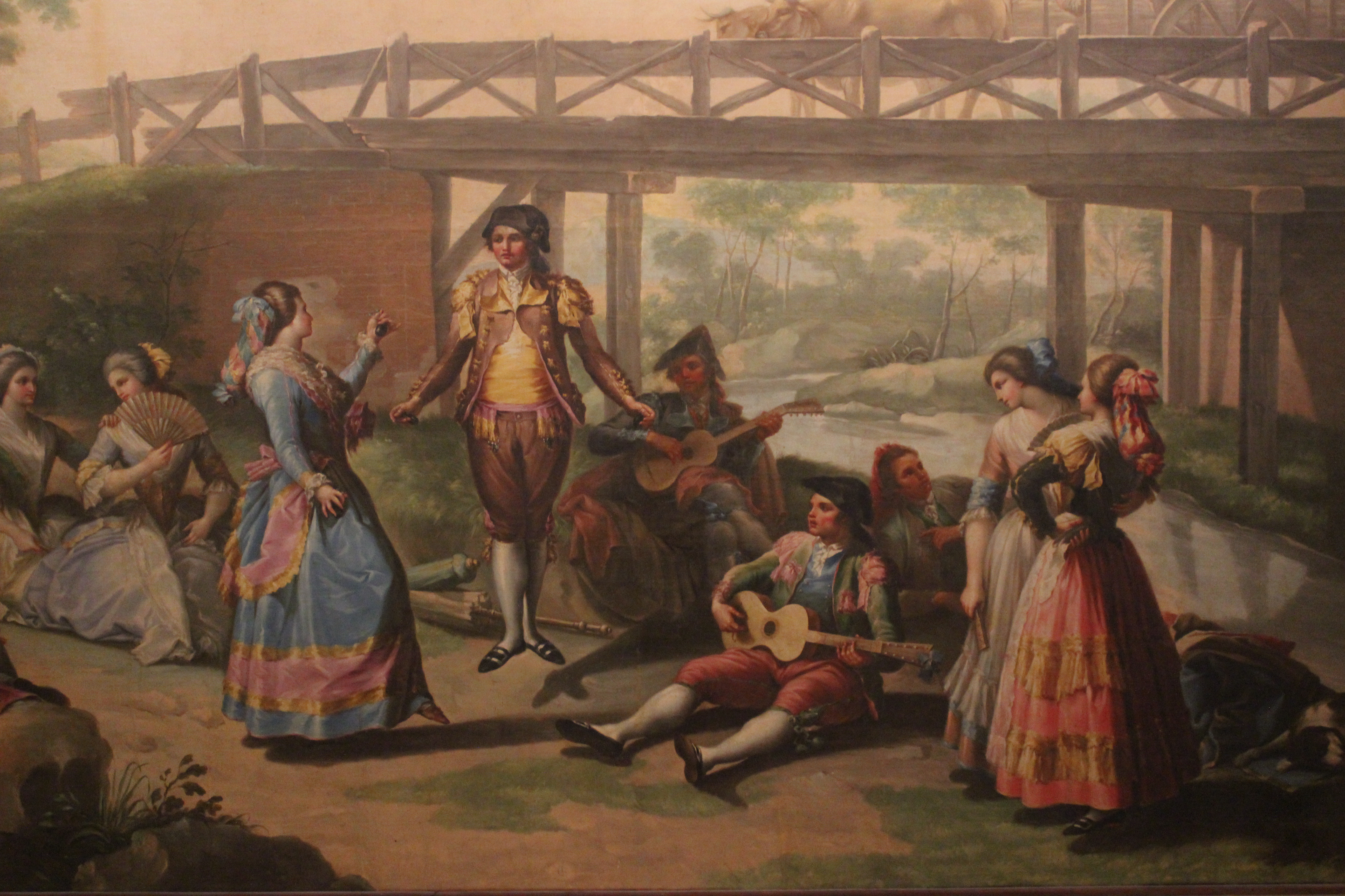 Ramón Bayeu. Un baile junto a un puente del canal del Manzanares, Museo de Historia de Madrid (depósito del Museo del Prado).